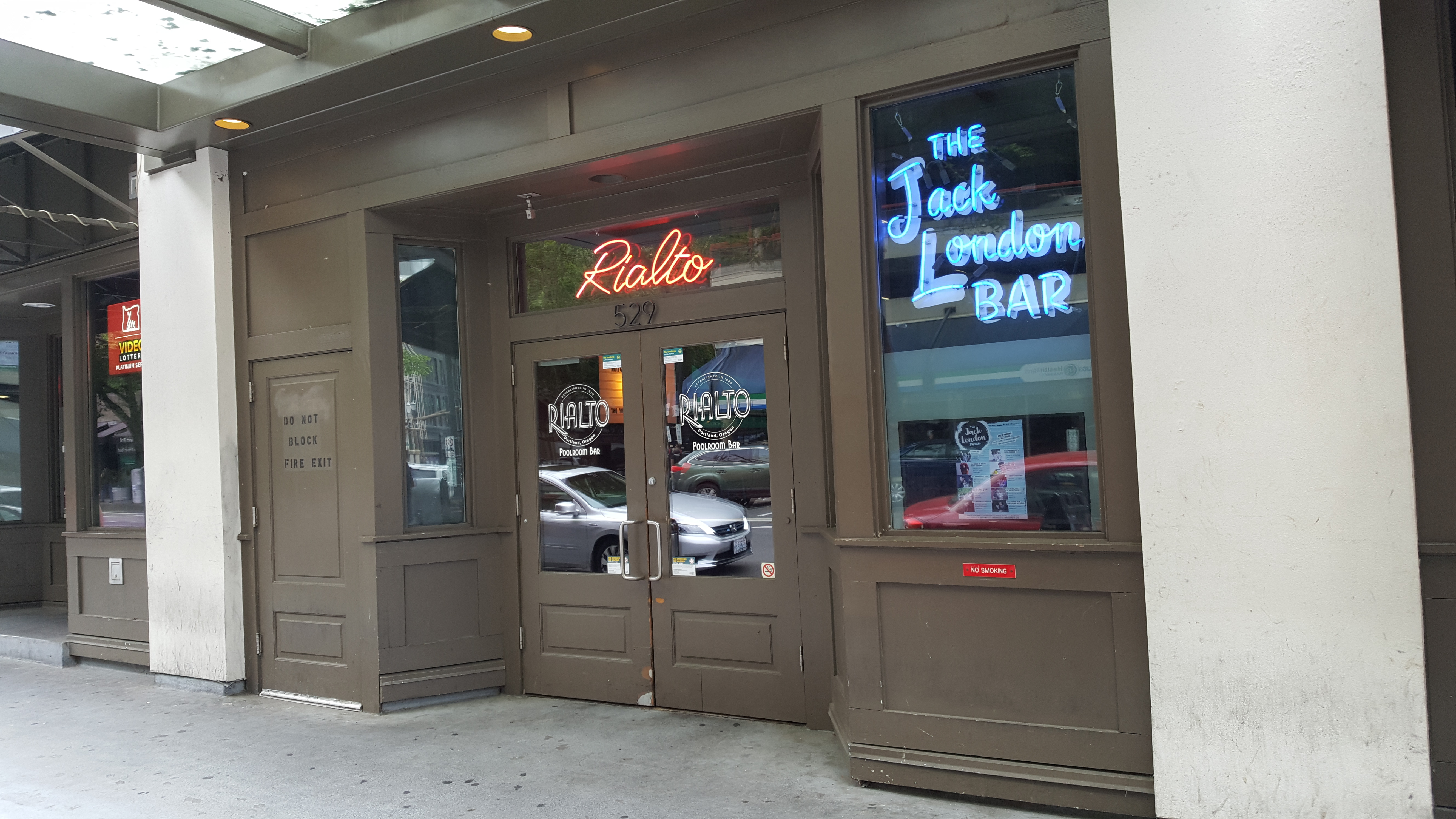 Rialto